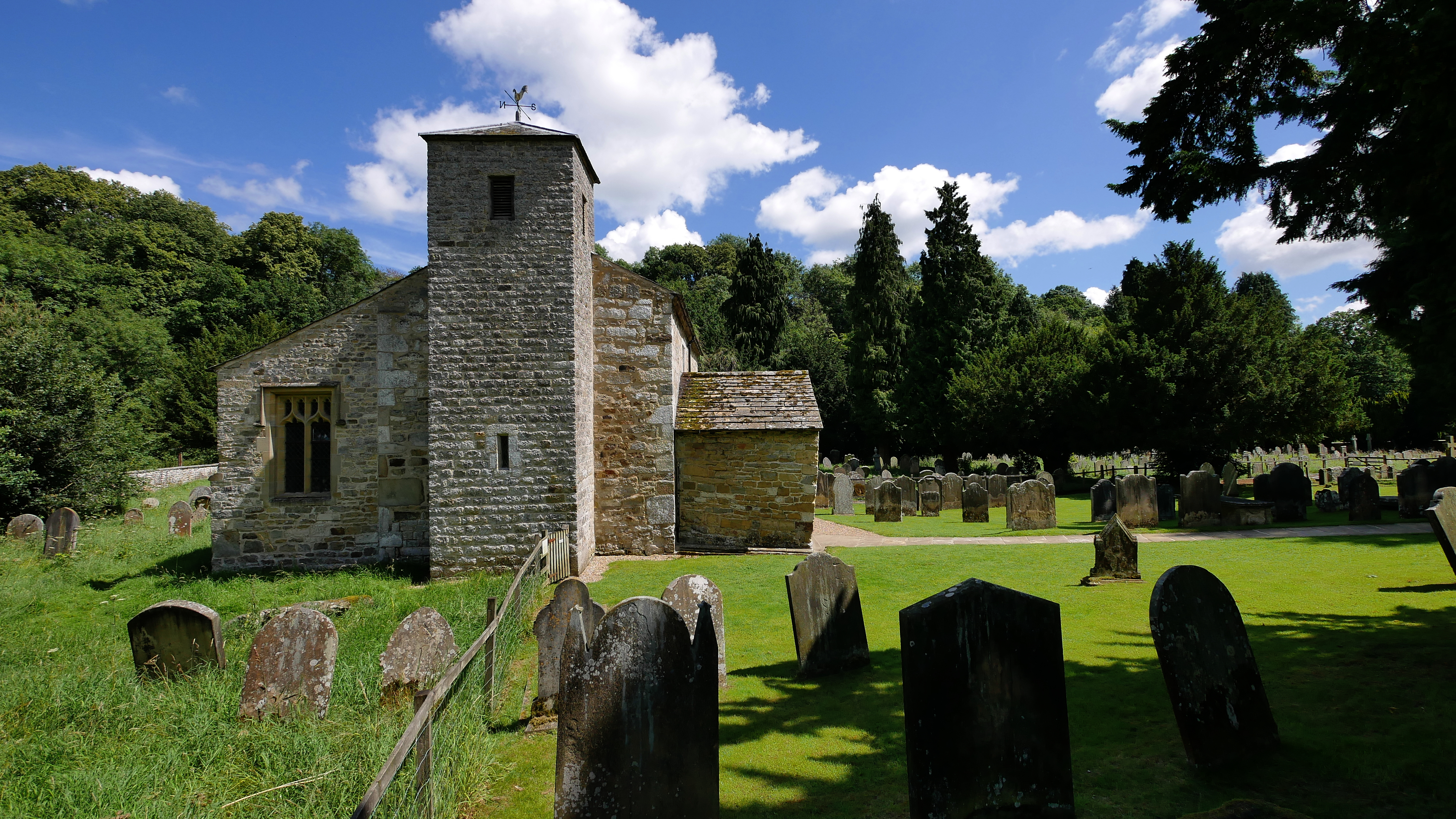 St Gregory's Minster, Kirkdale from the west - graveyard